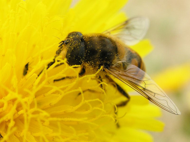 Eristalis tenax